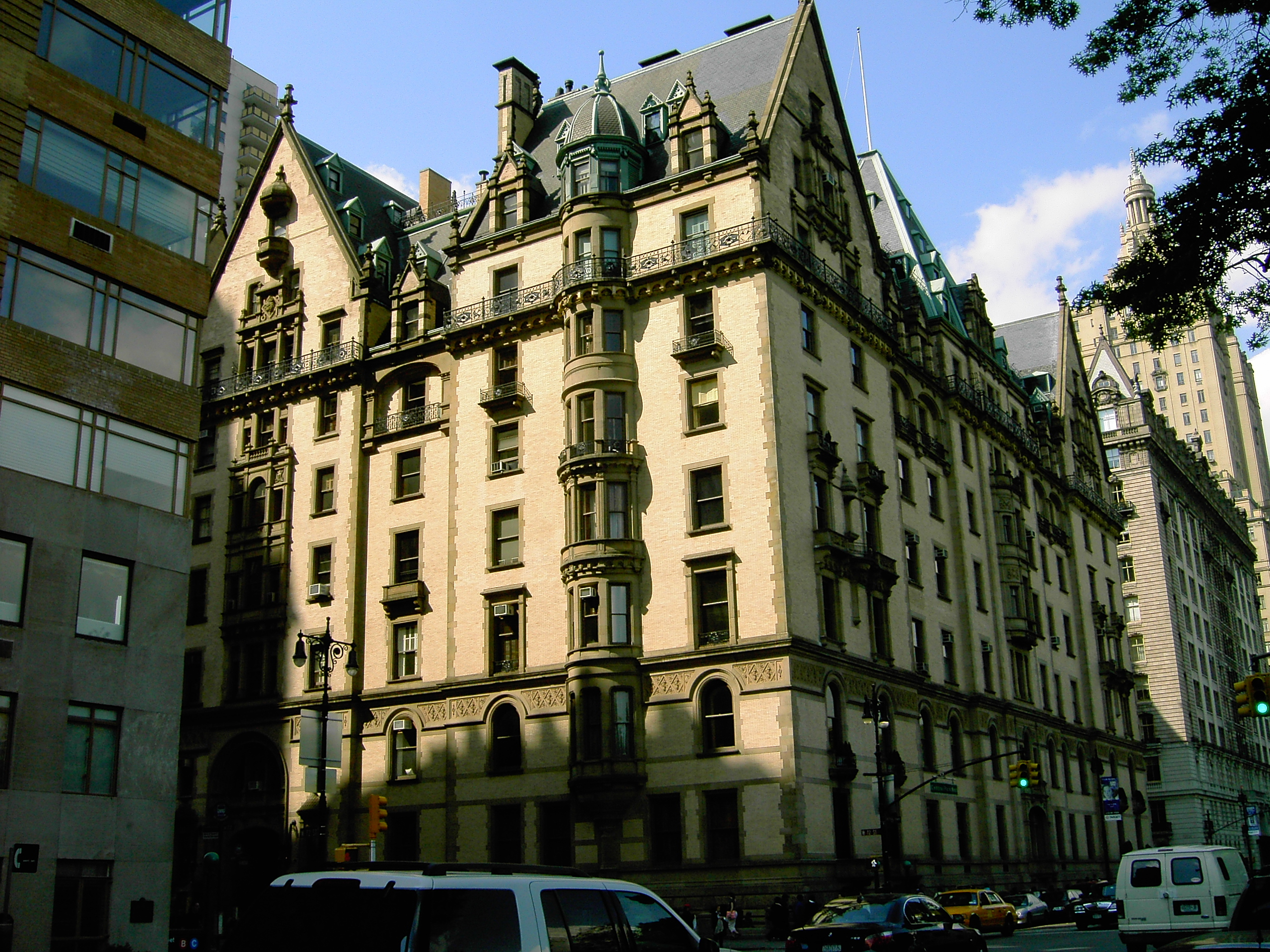 The Dakota, New York eigenes Foto 2005 GNU FDL